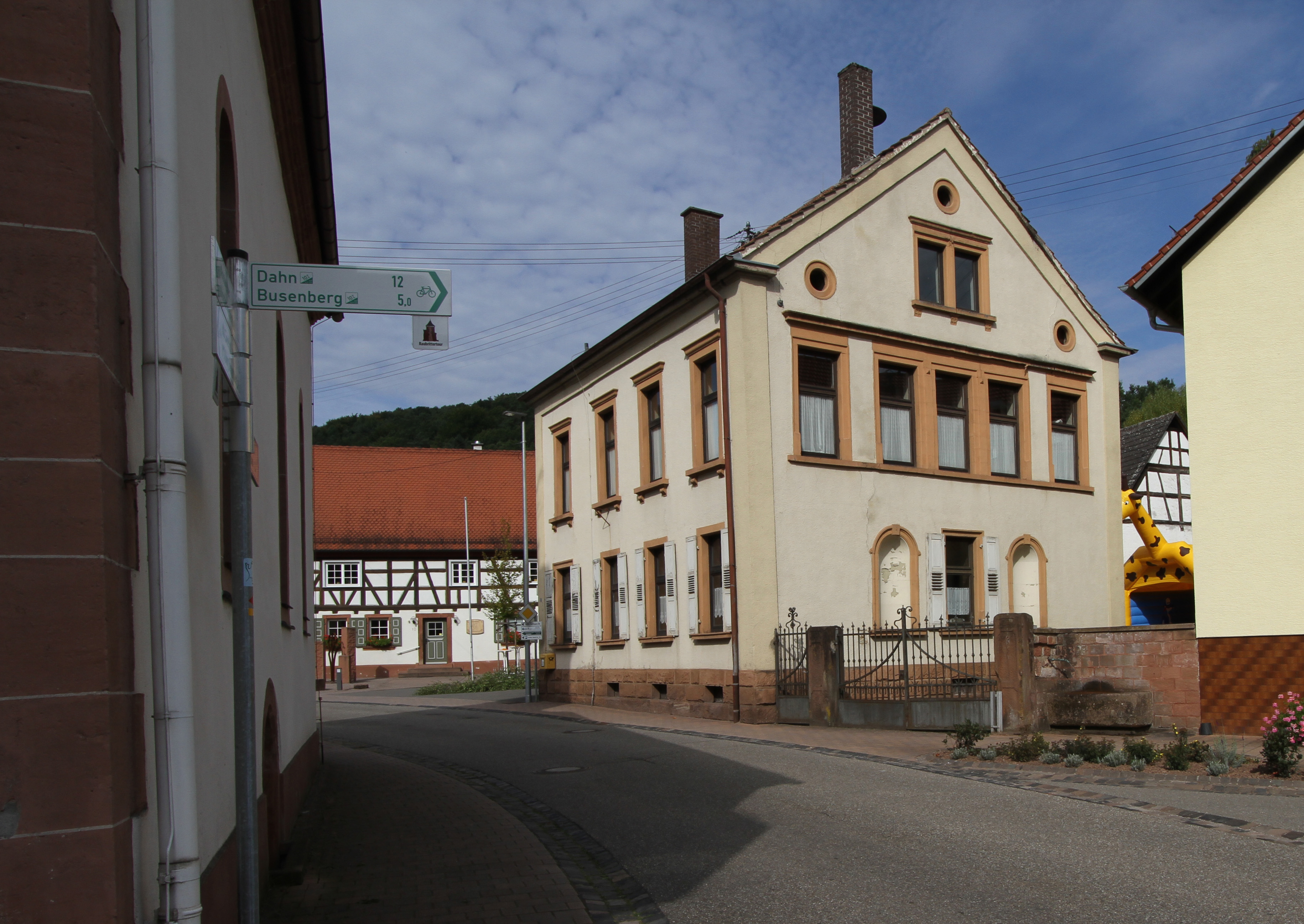 Erlenbach bei Dahn, Hauptstraße 6; ehemalige Schule; spätklassizistischer Putzbau, spätes 19. Jahrhundert.